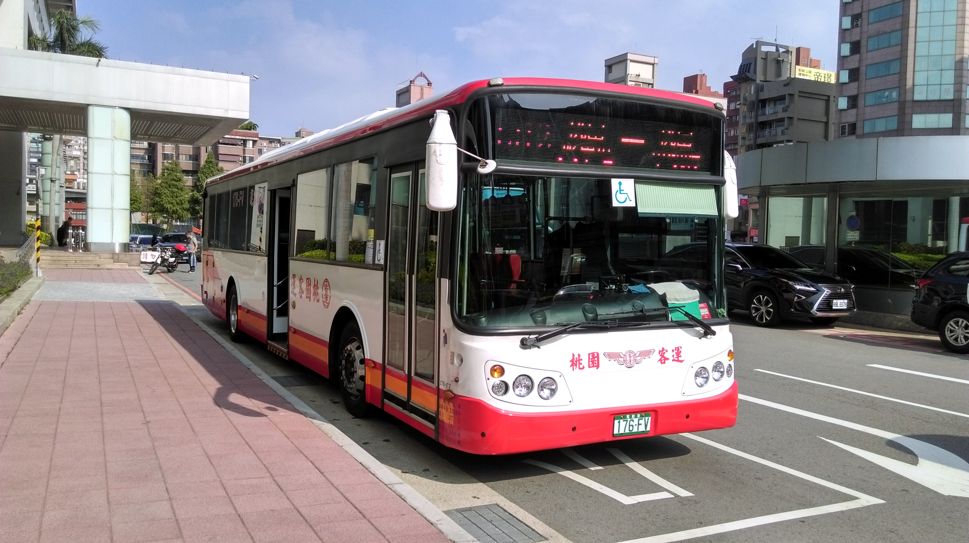 2016 RAC RACE150 176-FV